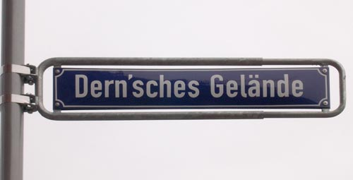 Straßenschild, Dernsches Gelände, Wiesbaden - Original